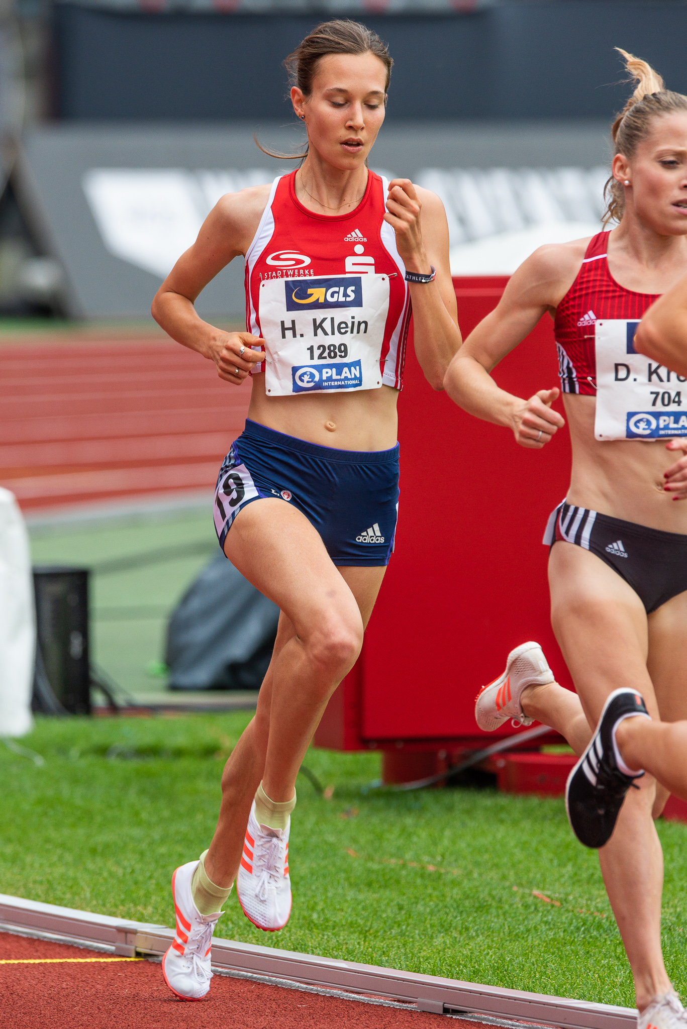 5000-Meter-Lauf,DLV,Deutsche Leichtathletik Meisterschaften 2018,Deutscher Leichtathletik-Verband,Hanna Klein,Max-Morlock-Stadion,SG Schorndorf 1846